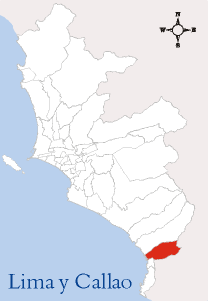 Localización del Distrito de San Bartolo Imagen elaborada por --Edgardo Reyes 22:07 9 mar, 2005 (CET) Categoría:Mapas del Perú (imagen)